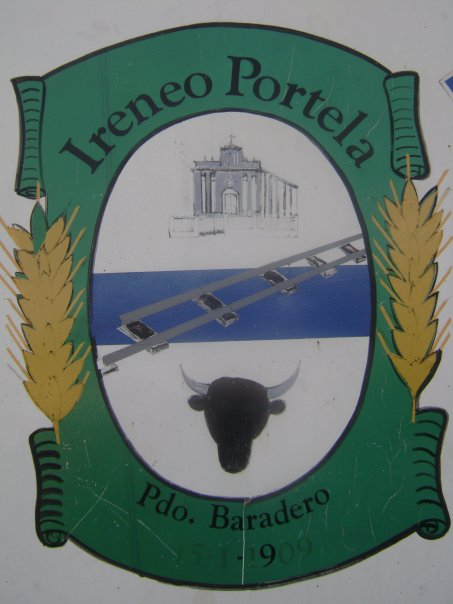 el creador del escudo es el SR, Matias Ramos , habitante de Ireneo Portela. Este escudo fue oficializado el 30 de diciembre de 1993 por el HCD de Baradero.